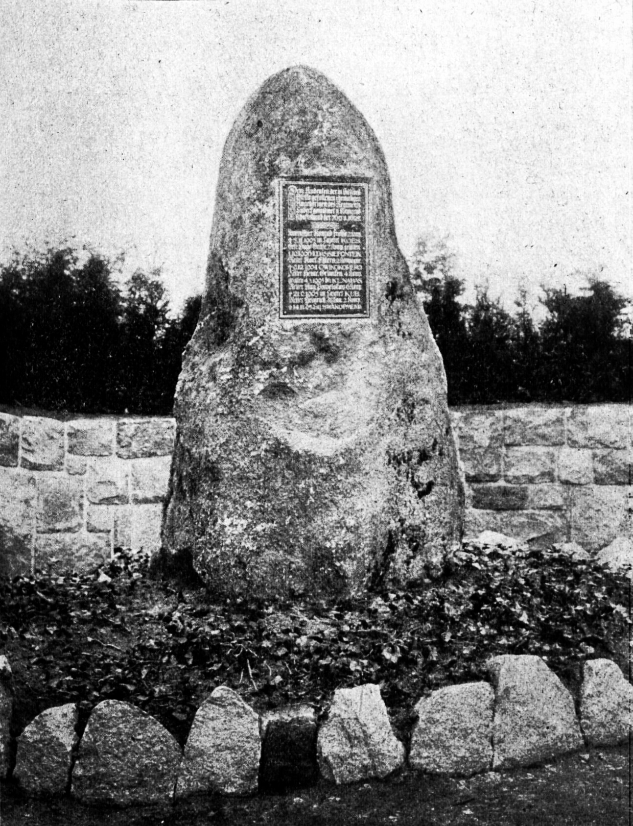 Gedenkstein für die in Deutsch-Südwest-Afrika gefallenen ehemaligen Angehörigen des Regiments „Lübeck“. Gestiftet vom Kameradschaftsbund der 76er und 162er zu Lübeck zum 10jährigem Regimentsbestehen